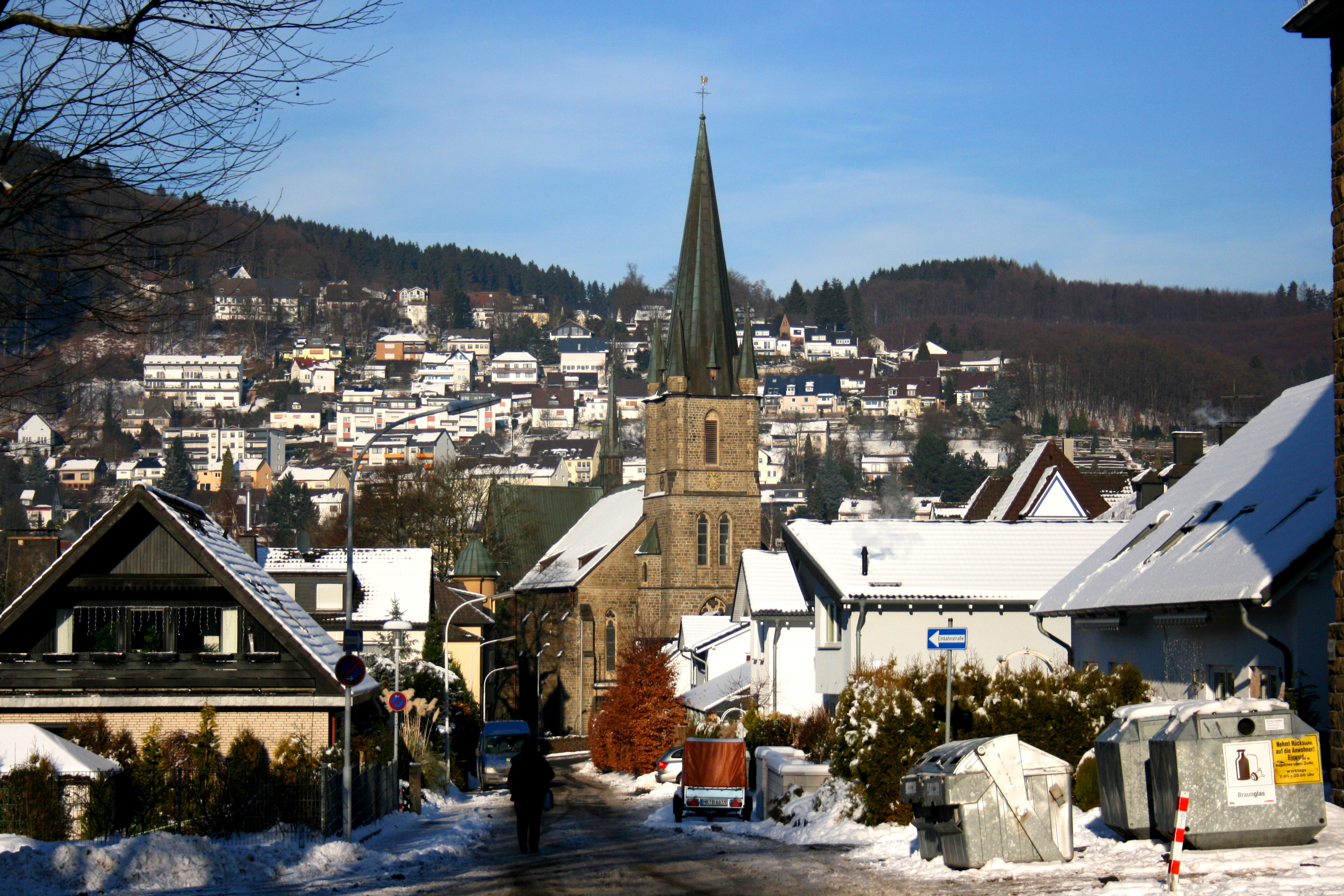 Mittelstraße in Werdohl